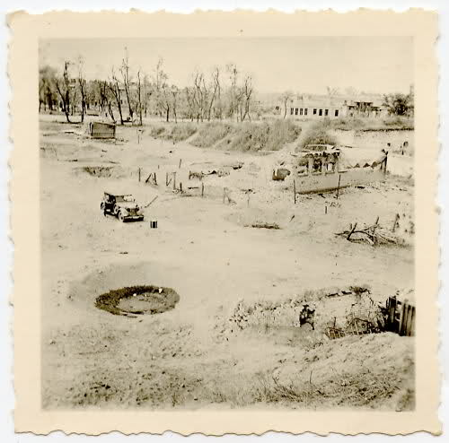 Въезд в Восточный форт .Вид 1941 года